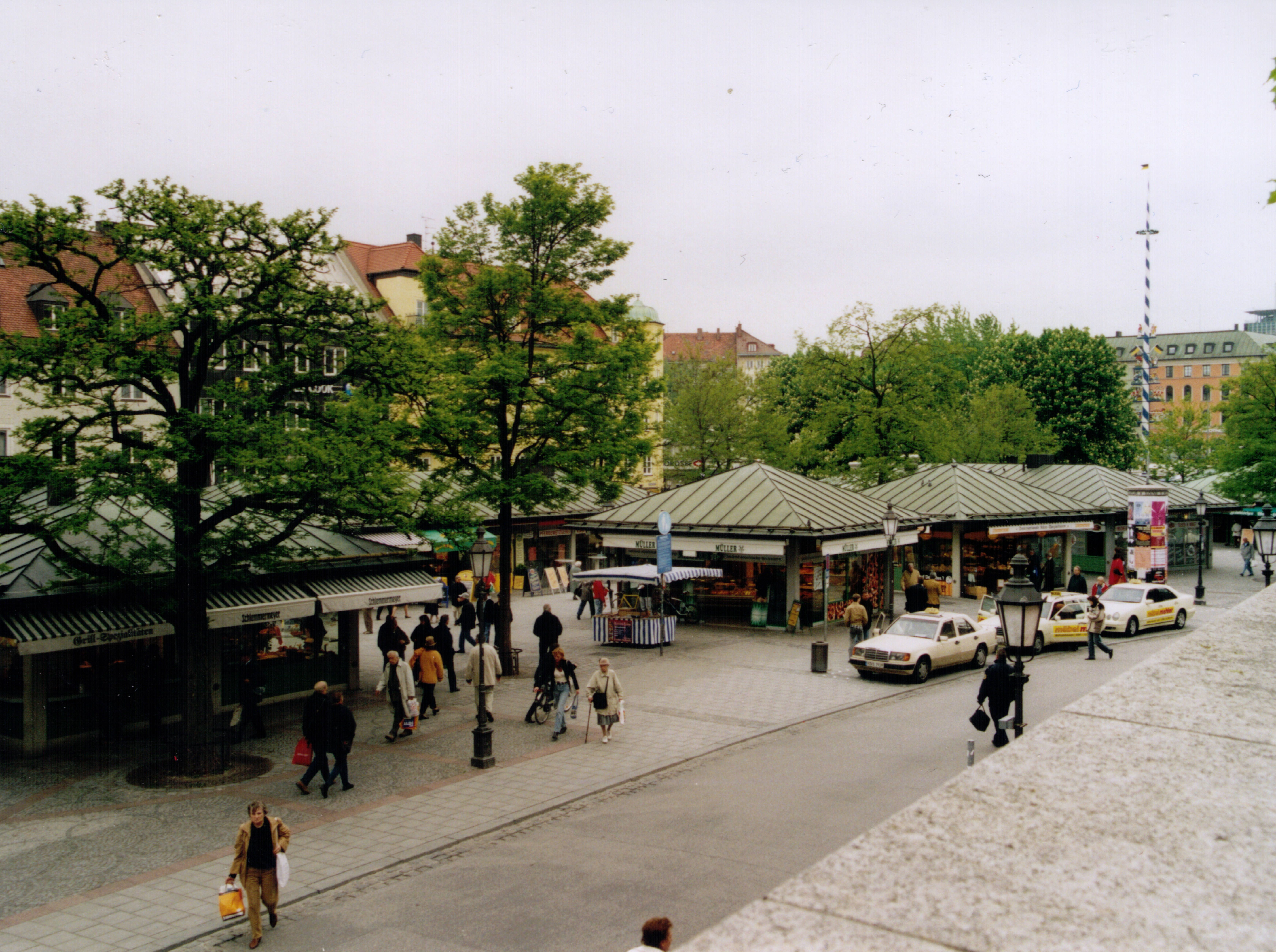 Blick auf den Viktualienmarkt, München Autor: Vom Einsteller, Wzwz selbst erstellt Pauschal: Alle JPGs sind von mir selbst erstellte Fotos, alle PNGs sind selbst gepixelt. Pauschal: Alle Bilder sind von mir ohne irgendeine Einschränkung meinerseits freigegeben, ob dies nun gleichbedeutend mit GNU-FDL oder mit PD ist, kann ich nicht entscheiden, es interessiert mich auch nicht. mfg., Wzwz 18:26, 13. Jun 2004 (CEST)